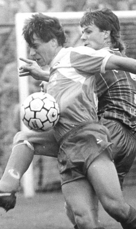 ADN- Wolfgang Kluge-22.9.90- Leipzig: 2. Runde DFV-Pokal- FC Sachsen Leipzig - FC Rot-Weiß Erfurt 0:2 (0:2) Mit großem Einsatz erkämpft sich Erfurts Mittelstürmer Jörg Schmidt den Ball vor Sachsen-Verteidiger Holm Pinder.